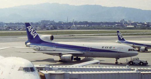 1992年夏ごろの大阪国際空港(OSA/RJOO)。写っているのは手前から、全日空(NH/ANA)のスーパージャンボ(B747SR-81)、トライスター(L-1011-1)、A320(A320-211)です。 (1992 Osaka International Airport, JAPAN)